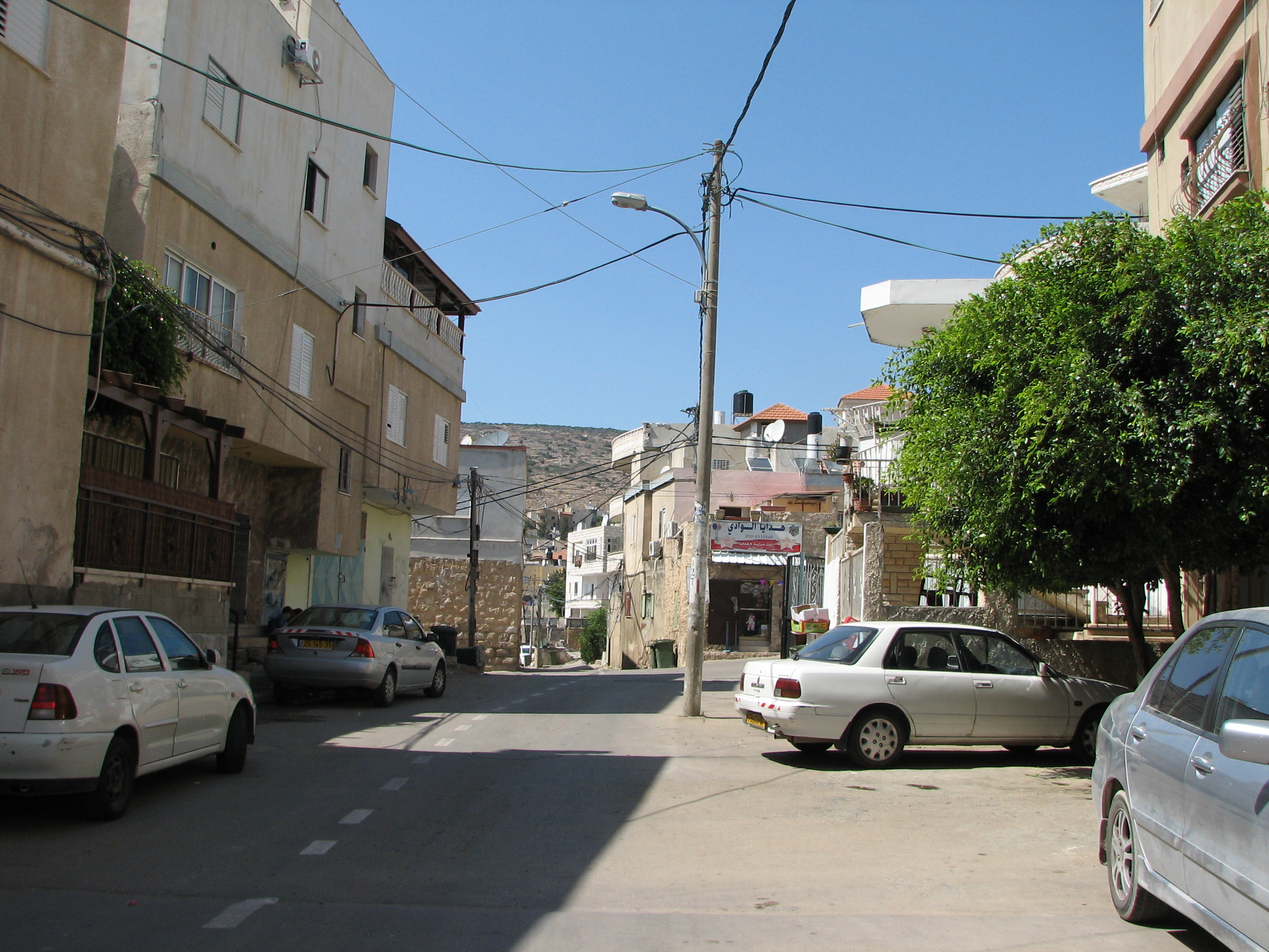 Tur'an, is an Israeli-Arab local council in the North District of Israel. It is located on Mount Tur'an near the main road from Haifa to Tiberias טורעאן, היא מועצה מקומית ערבית במחוז הצפון בישראל. היא הוכרזה כמועצה מקומית בשנת 1959., שוכנת על הר טורעאן על הדרך במובילה מחיפה לטבריה ליד צומת גולני רחוב בכפר